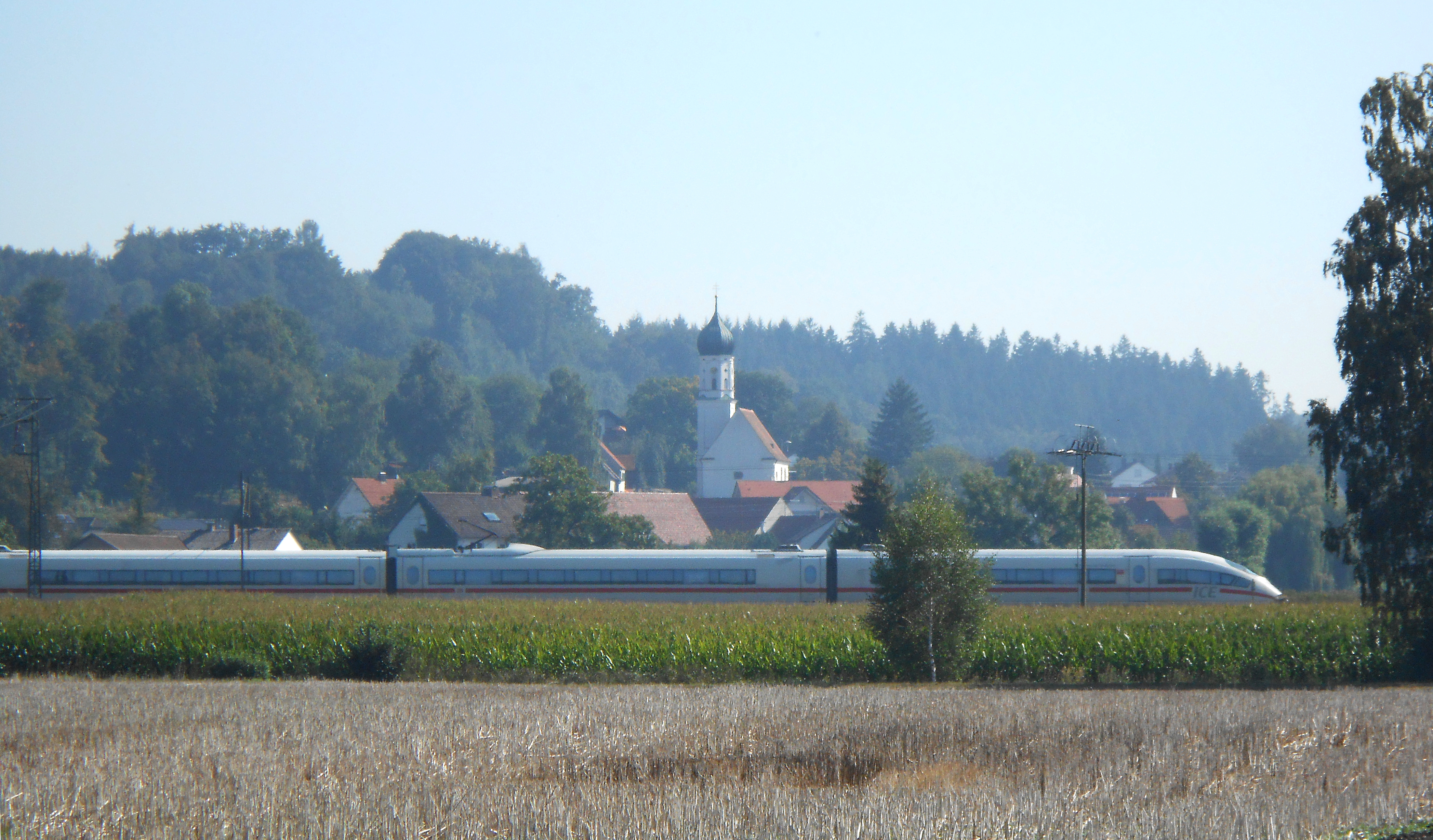 ICE vor dem Dorf Mindelaltheim (von Westen)